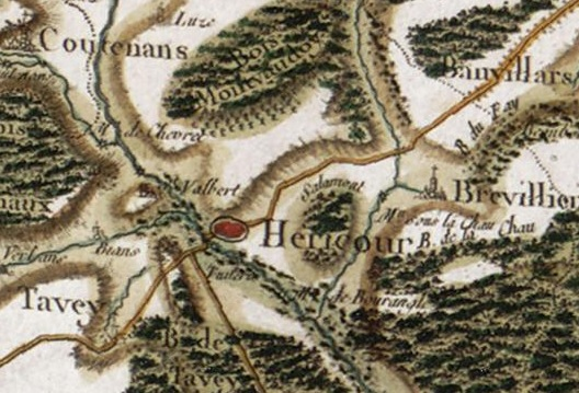 Héricourt (70) sur la carte de Cassini.